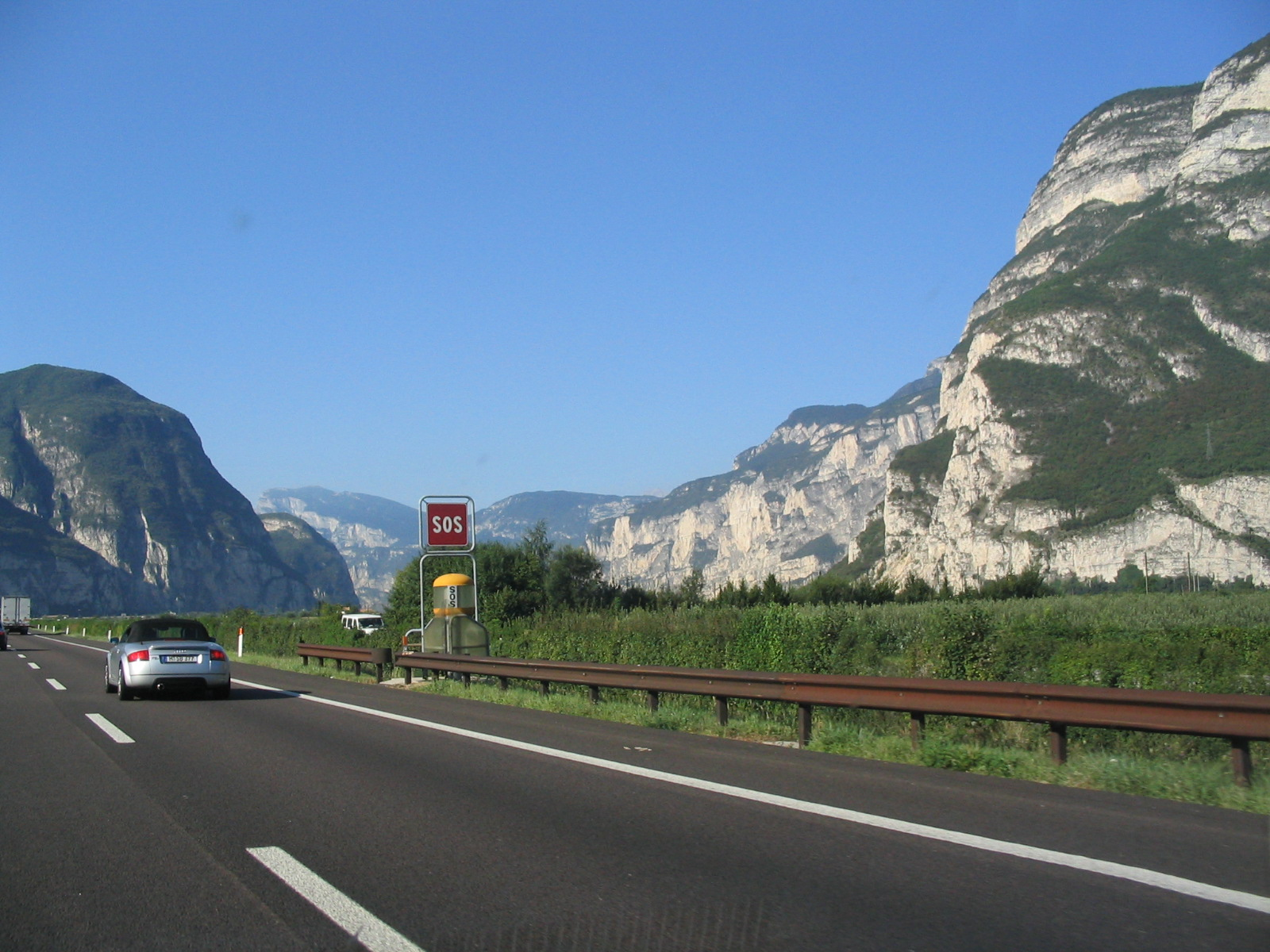 Brennerautobahn im Südtiroler Unterland